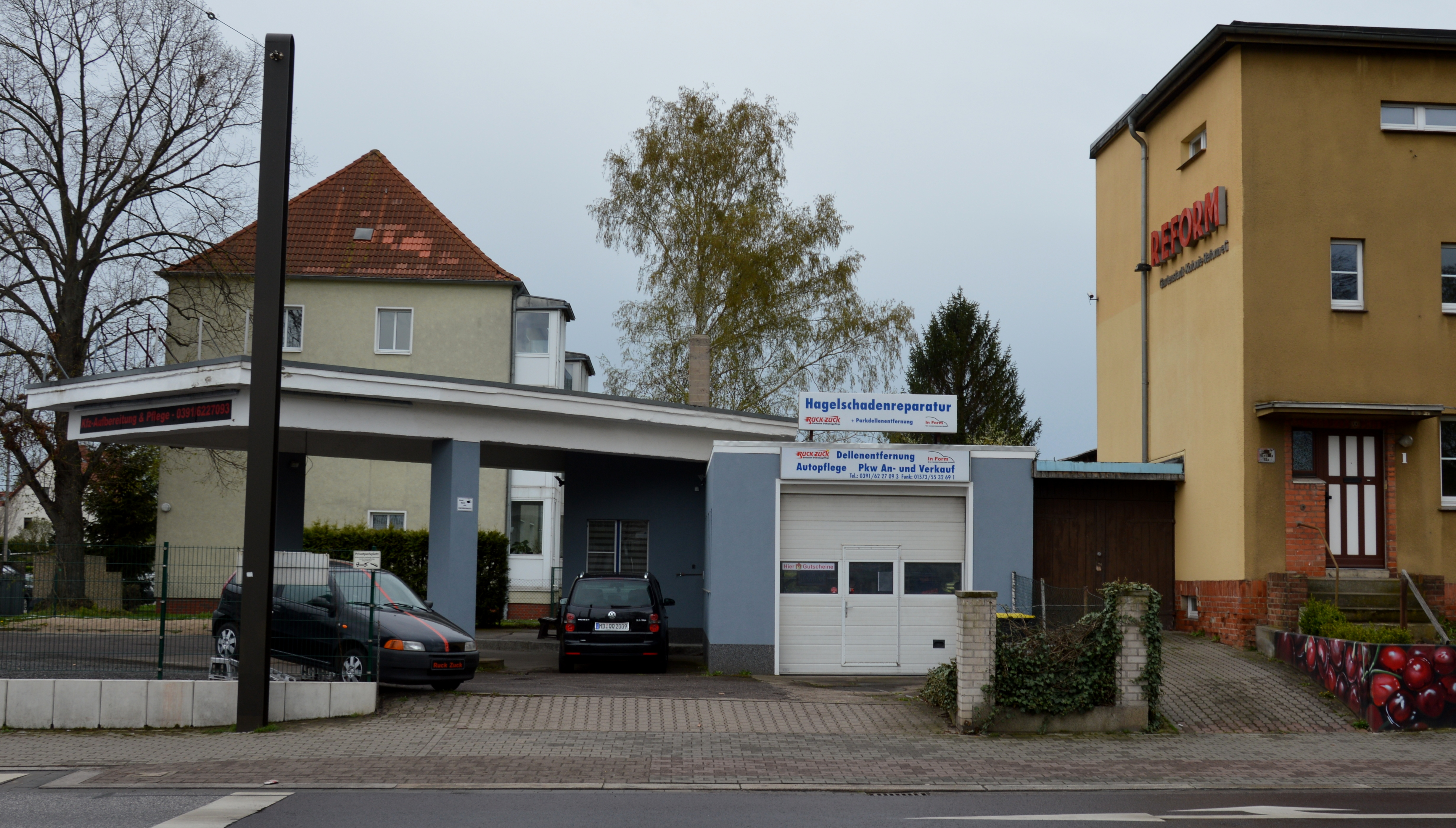 Tankstelle Kirchweg